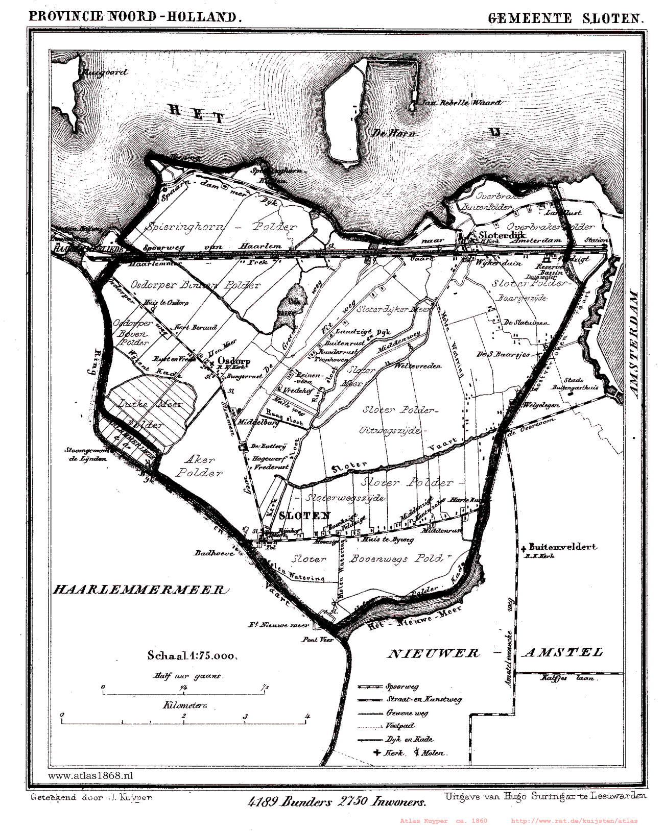 Kaart van Sloten (Amsterdam) uit Gemeente Atlas van Nederland, J. Kuyper 1865-1870, Uitgave Hugo Suringar Leeuwarden.